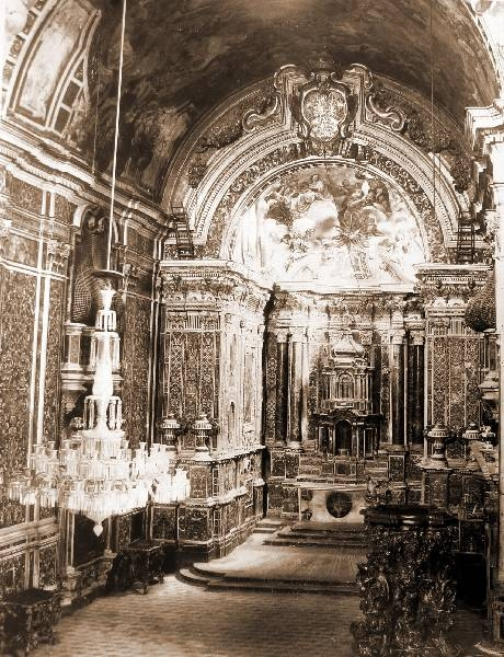 La Chiesa di San Gregorio a Messina, che era stata progettata da Filippo Juvarra, prima della distruzione per opera del terremoto del 1908.